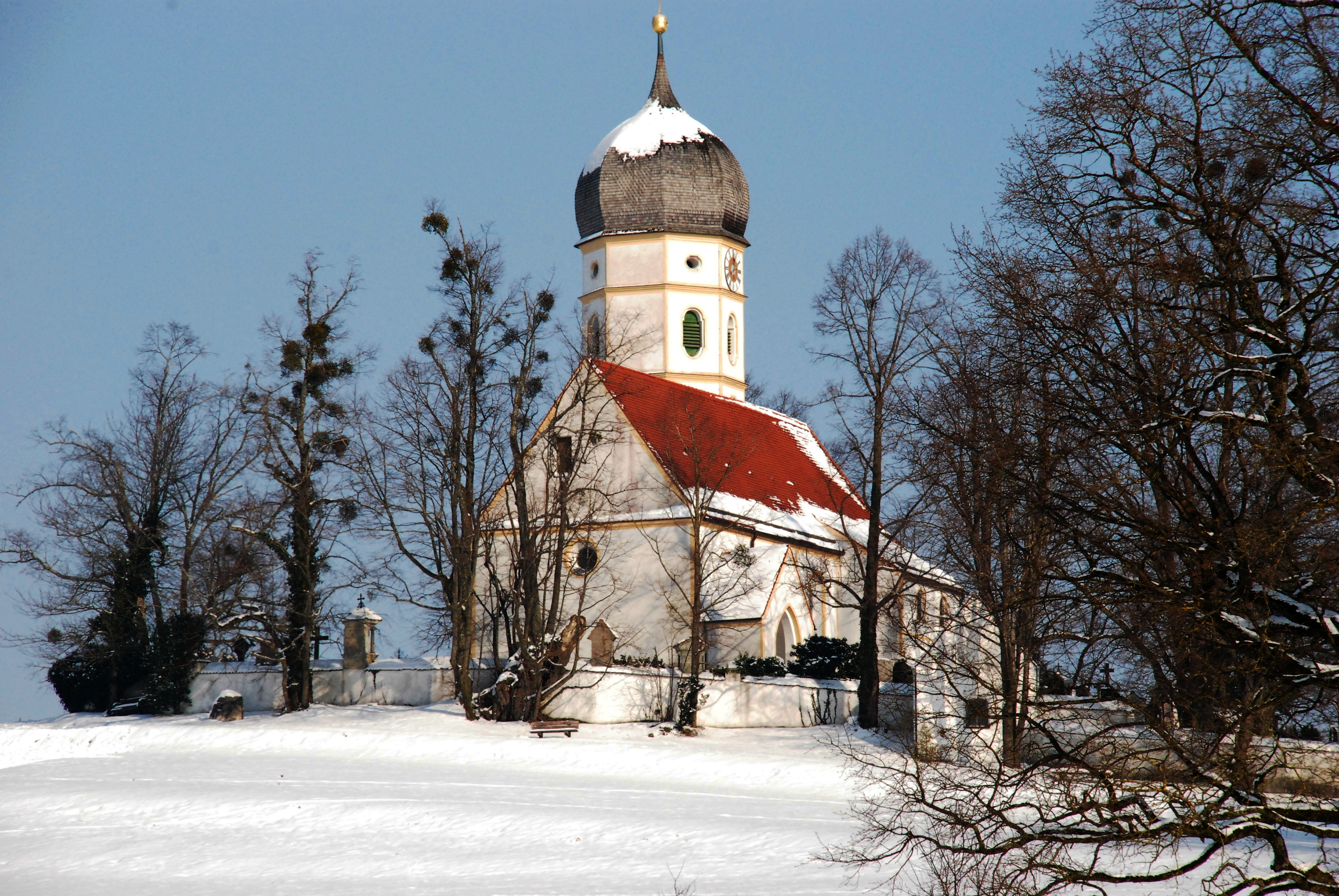 Kirche St. Johannes d. T. und Georg in Holzhausen, Gemeinde Münsing, Landkreis Bad Tölz-Wolfratshausen, Regierungsbezirk Oberbayern, Bayern. Als Baudenkmal in der Bayerischen Denkmalliste aufgeführt.